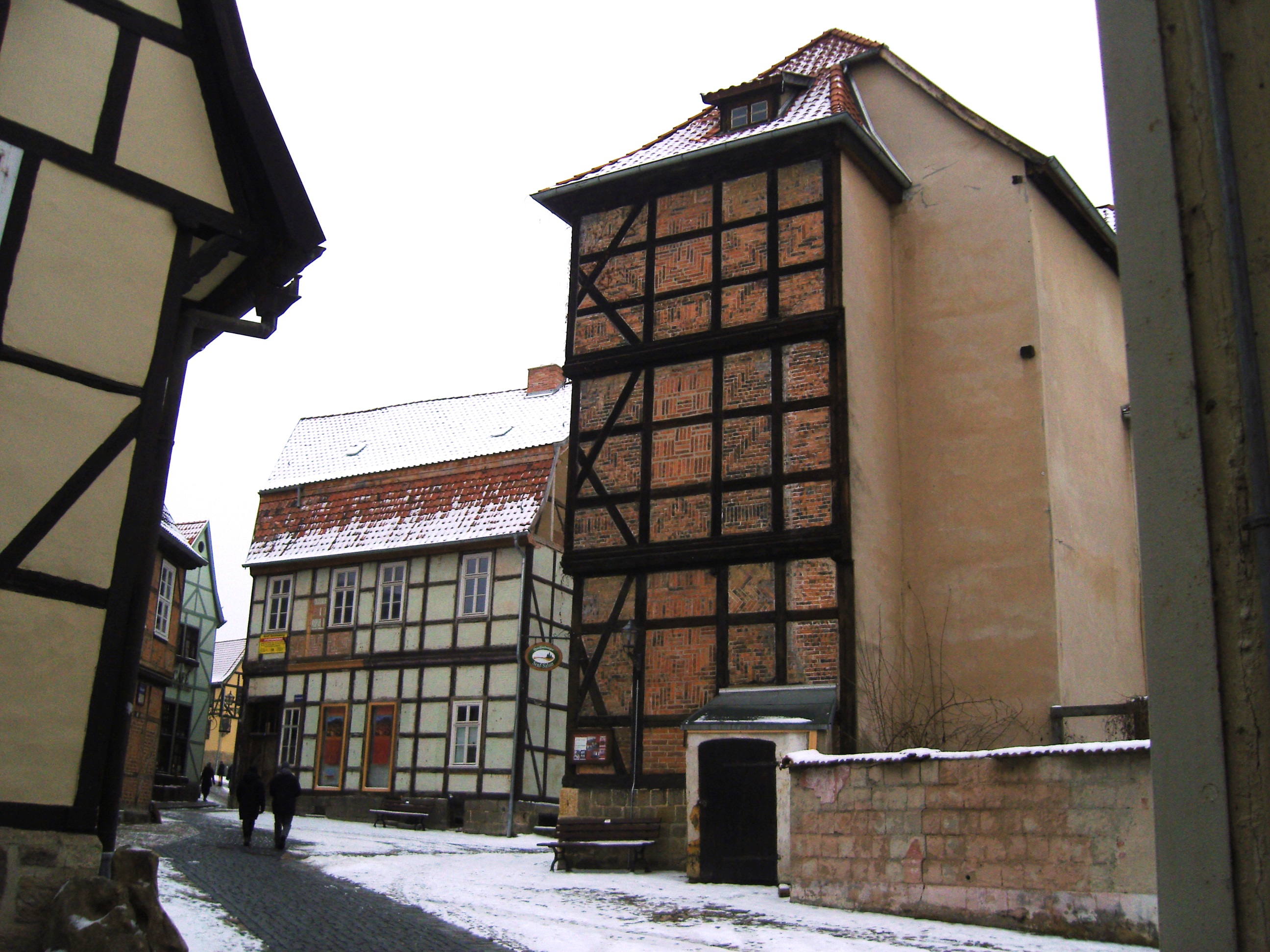 Denkmalgeschütztes Wohnhaus im Finkenherd 4 (im Hintergrund) und 6 (Seitansicht rechts) in Quedlinburg